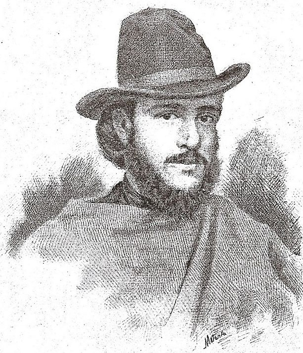 Rosalino Pilo L'immagine si trova nel libro di Jack la Bolina: Tre garibaldini-Ippolito Nievo, Rosalino Pilo, Agostino Bertani edito dall'Istituto per il libro del popolo a Milano nel 1924